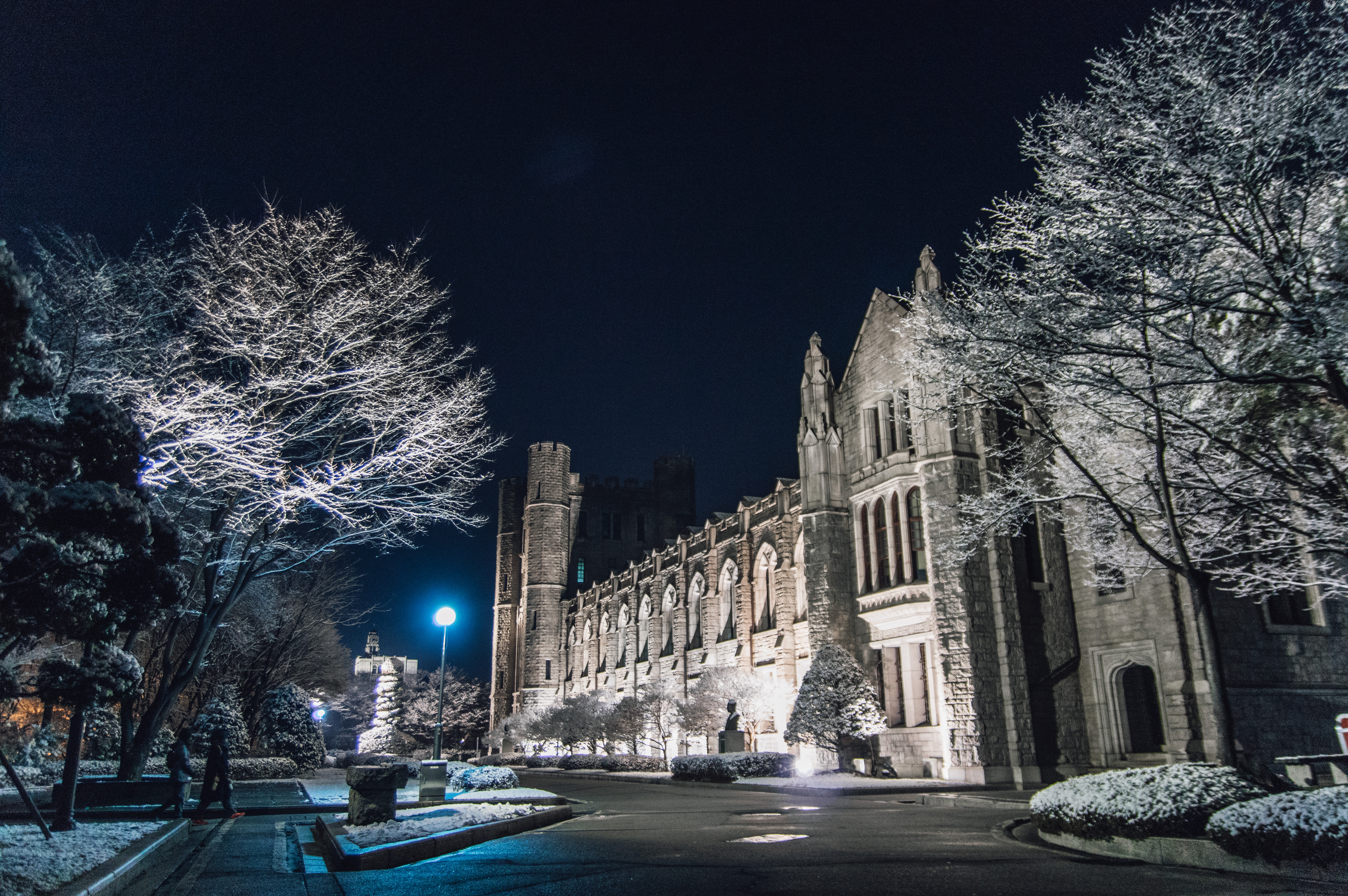 고려대학교 구 중앙도서관